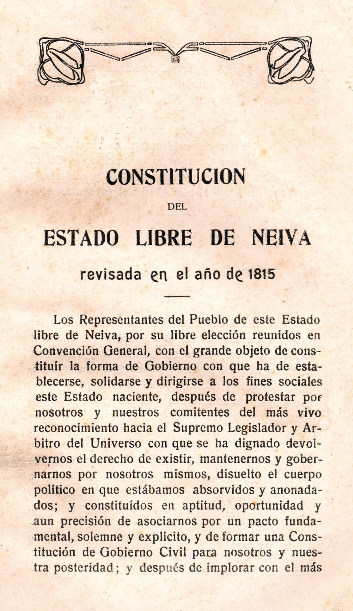 Constitución del Estado Libre de Neiva de 1814 (Revisión de 1815)